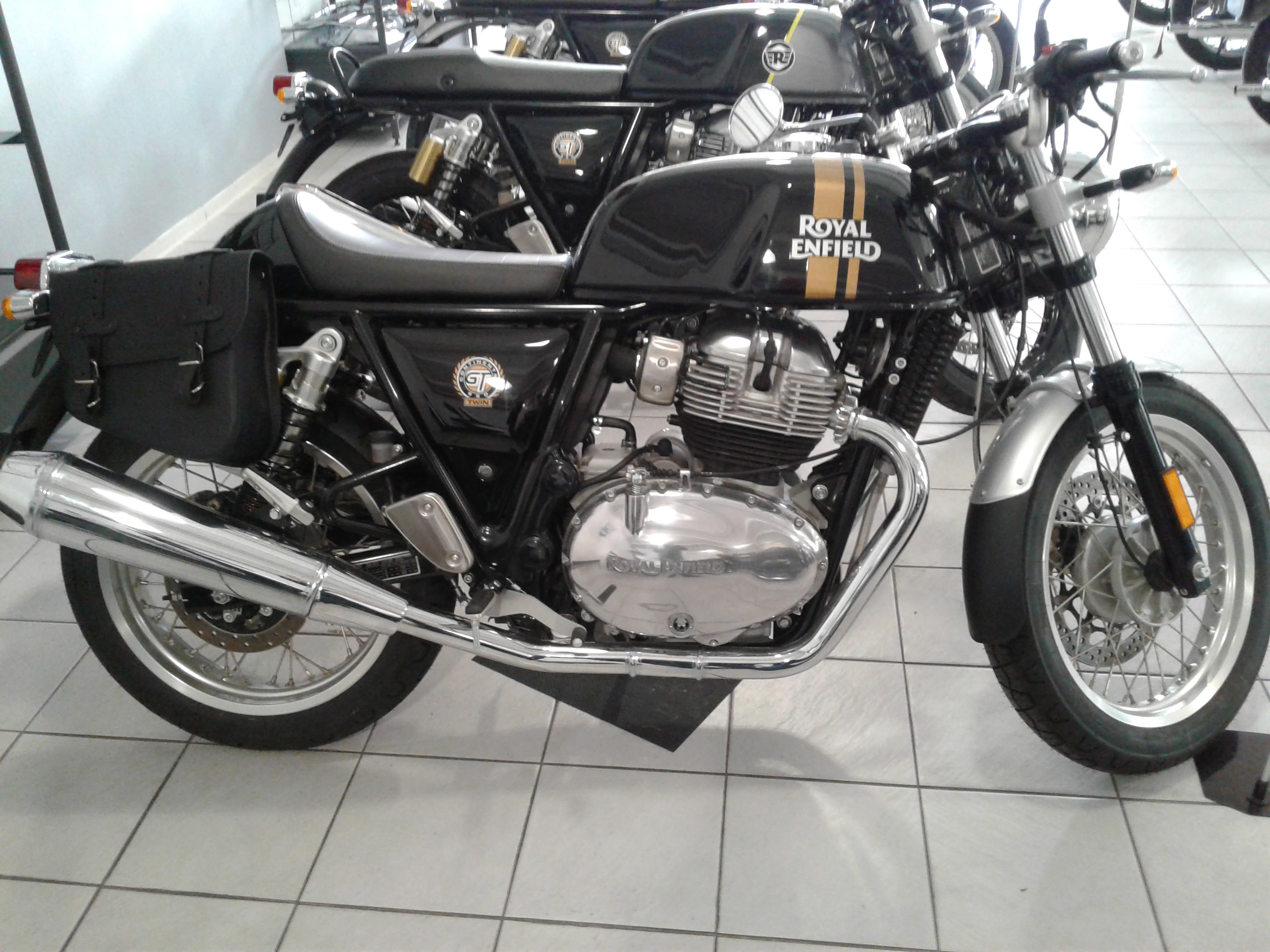 Royal Enfield 650 Anmerkungen = eigenes Bild beim Händler DO